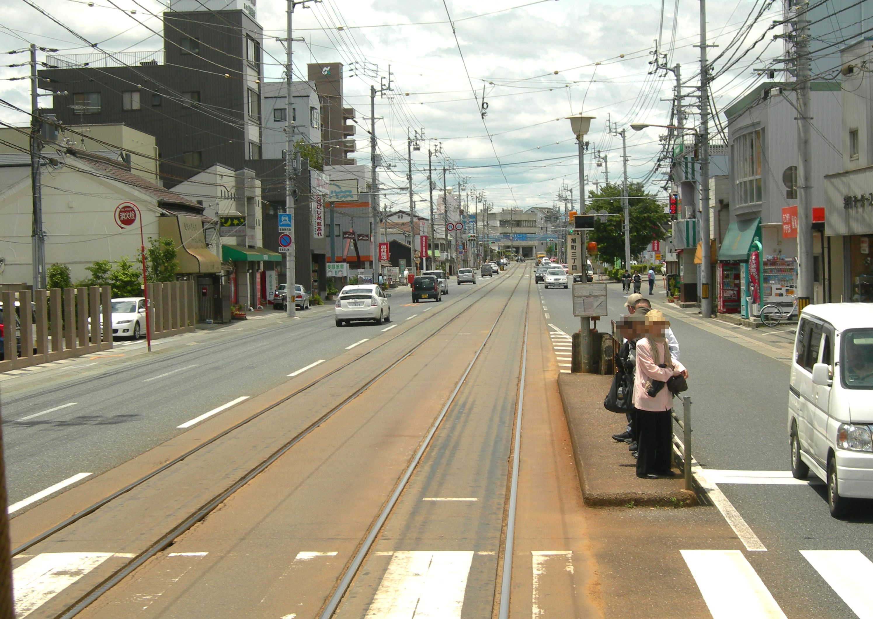 土佐電気鉄道旭町三丁目電停。